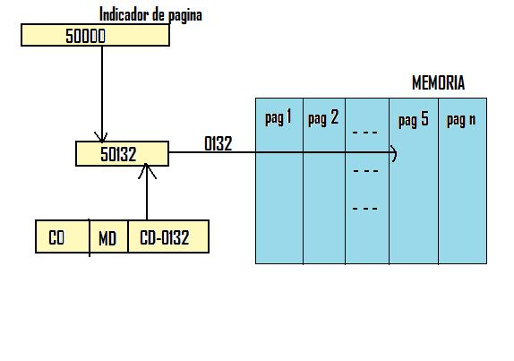 Funcionamiento del direccionamiento paginado